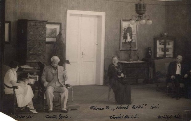 Móricz Zsigmond: Kerek Ferkó. Nemzeti Színház. Bemutató: 1931-10-30. Rendező: Csathó Kálmán. Mária: Bajor Gizi, Kerekegyházi: Csortos Gyula, Koczog polgármester felesége: Vízvári Mariska, Koczog polgármester: Mihályfi Béla. Hungarian Theatre Museum and Institute LocationBudapestCoordinates47° 29′ 51.75″ N, 19° 01′ 47.32″ E Established1952Web pageszinhaziintezet.hu Authority control : Q1226166 VIAF: 152589477 ISNI: 0000 0001 0945 5202 BNF: 123022856 NKC: mzk2010513258 institution QS:P195,Q1226166